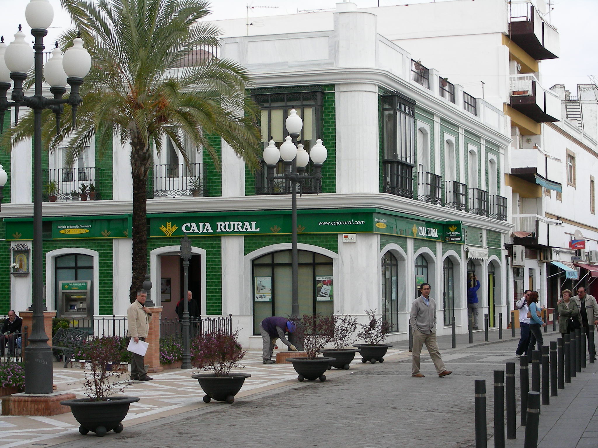 Isla Cristina. Plaza de las Flores, lugar donde se localizaba el antiguo ayuntamiento y actualmente se abre la calle Armada Española.